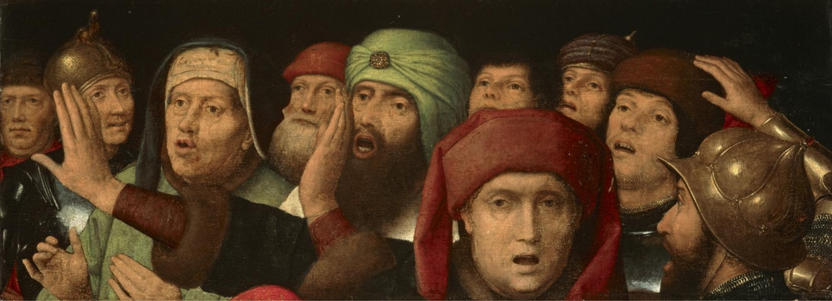 Catalan: Part d'un retaule no identificat amb un una Crucifixiólabel QS:Lca,"part d'un retaule no identificat amb un una Crucifixió"